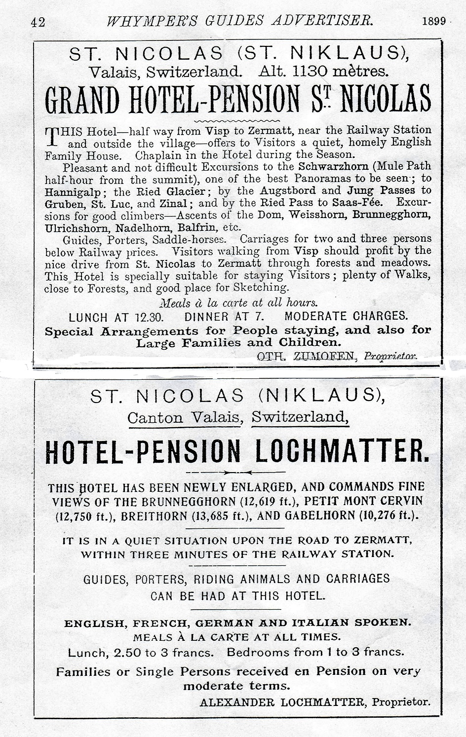 Hotel Lochmatter und Grand Hotel, St. Niklaus VS, Whymper´s Guides Advertiser, London 1899.